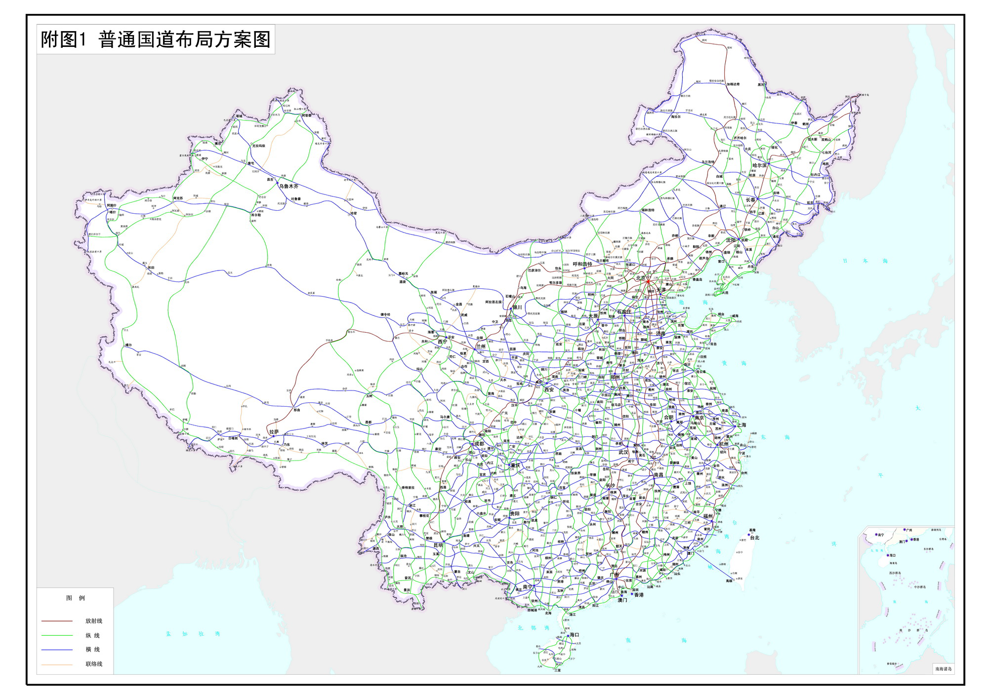 国家公路网规划（2013-2030年）中的国道规划